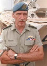 romeo dallaire